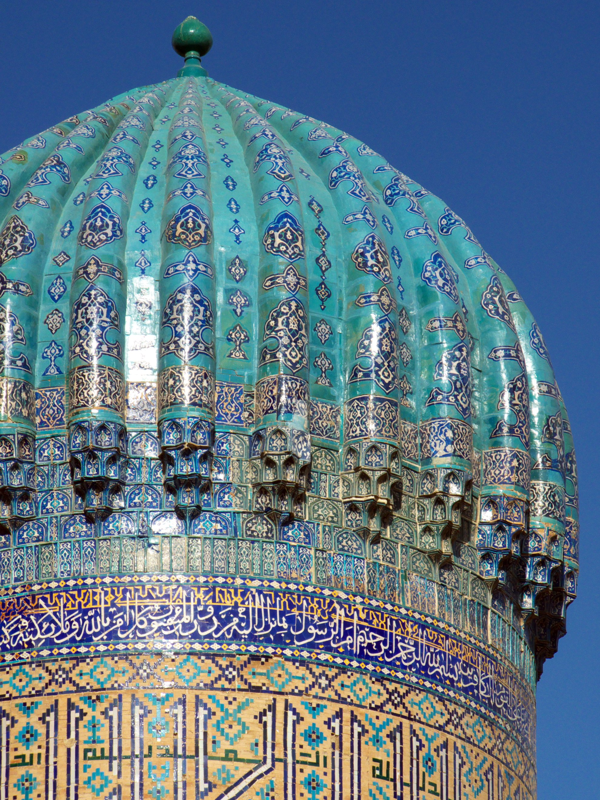 Shir Dor Madrassah, The Registan, Samarkand